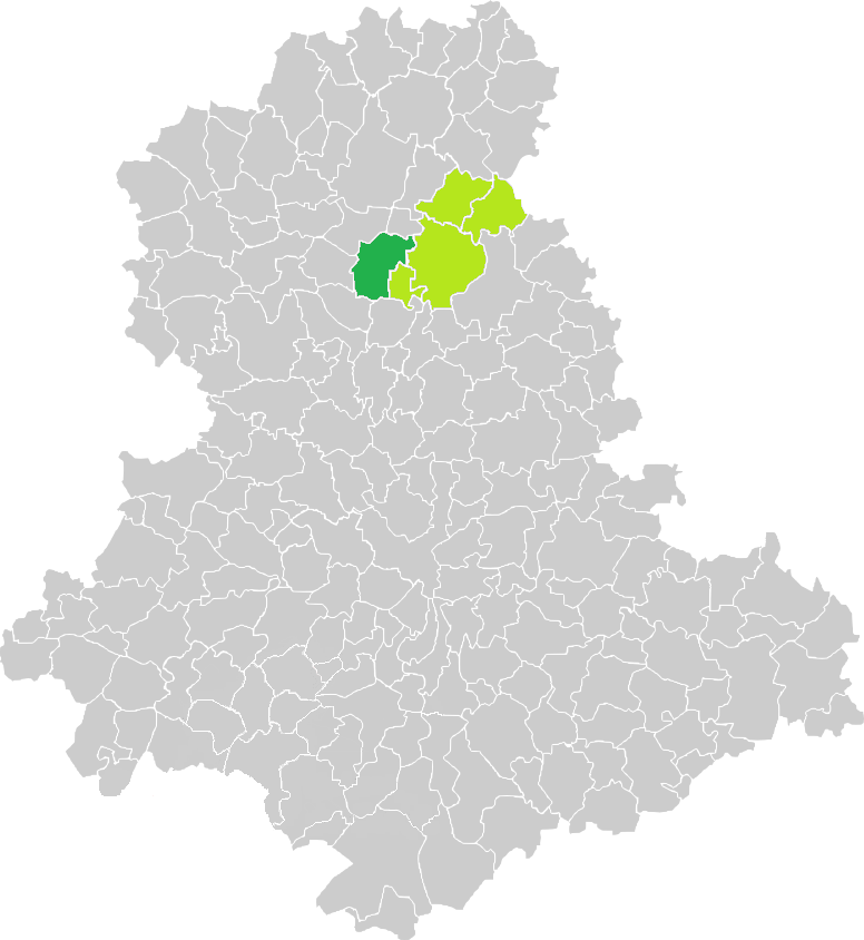 Carte de situation de la commune de Rancon (en vert foncé) dans le votre Canton (en vert clair) sur une carte des communes de la Haute-Vienne